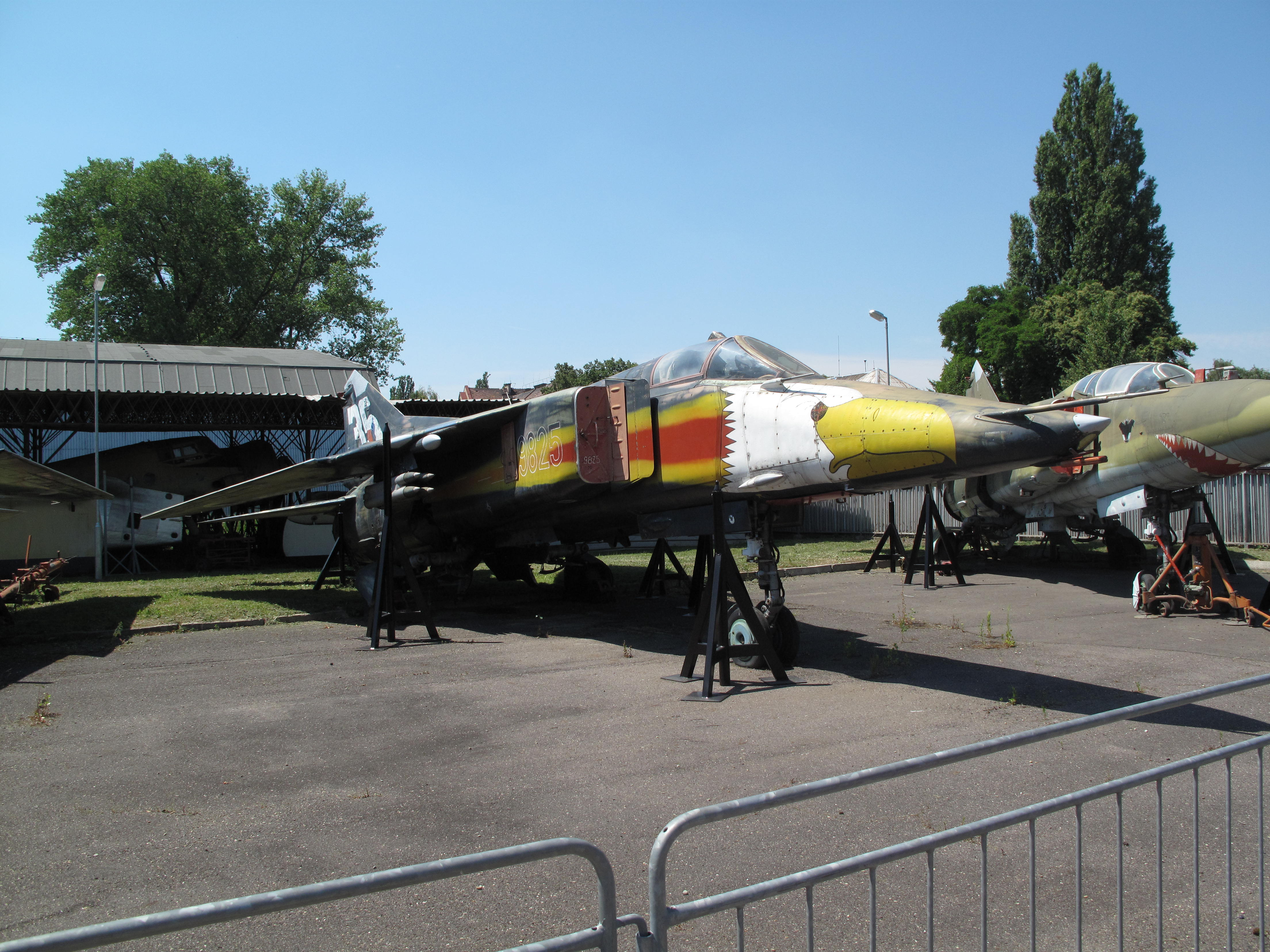 Mikoyan-Gurevich MiG-23BN ; Letecké muzeum Kbely